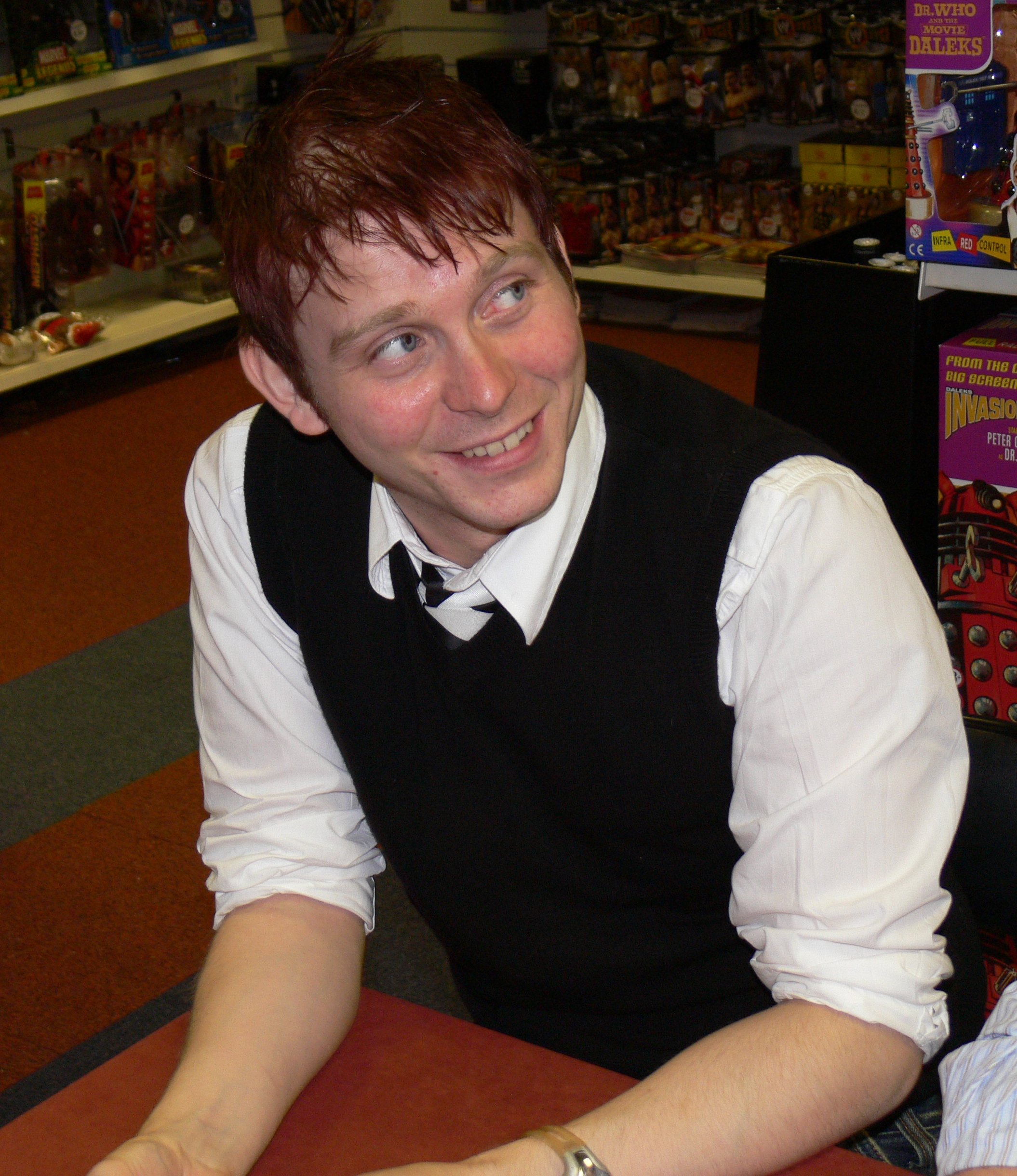 Vocal Coach & ProducerEddie Robson.